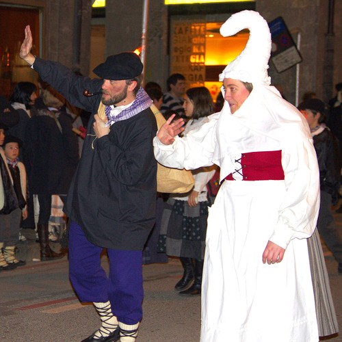 Olentzero eta Mari Domingi Tolosan.